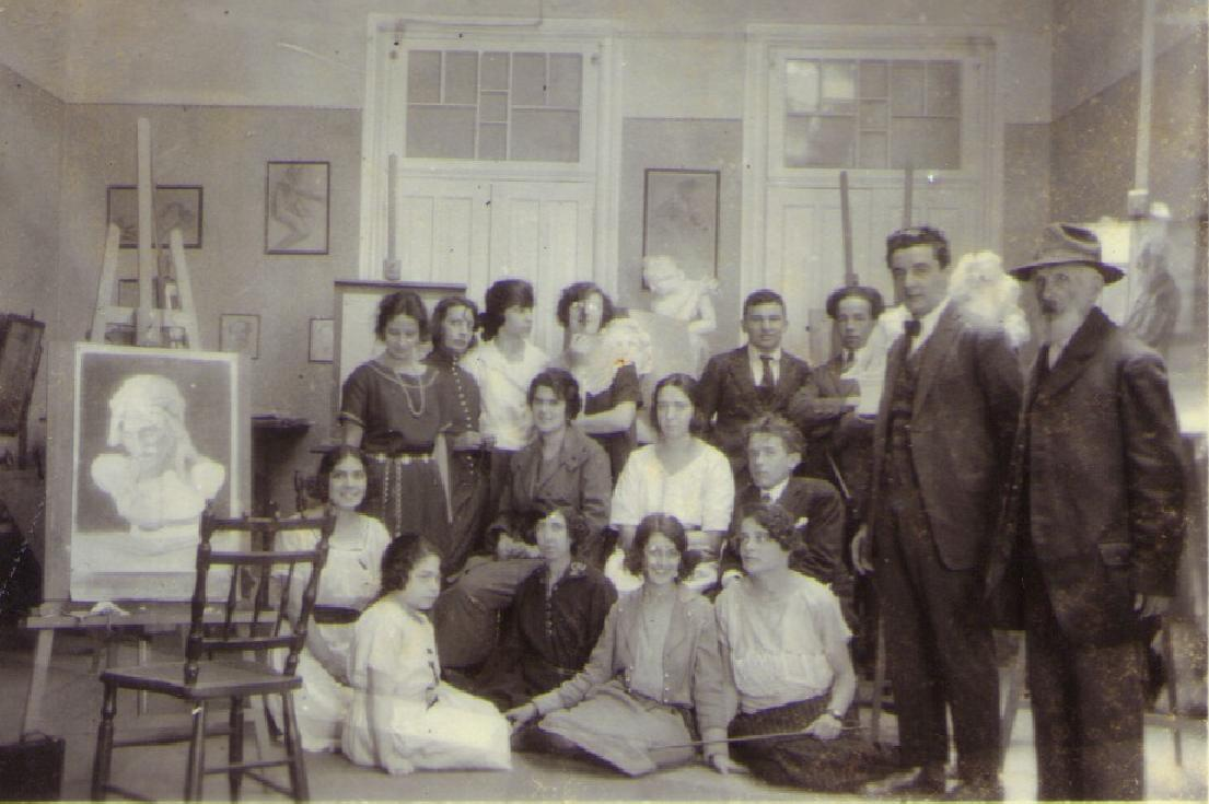 Estudantes no atelier da Escola de Artes em 1925